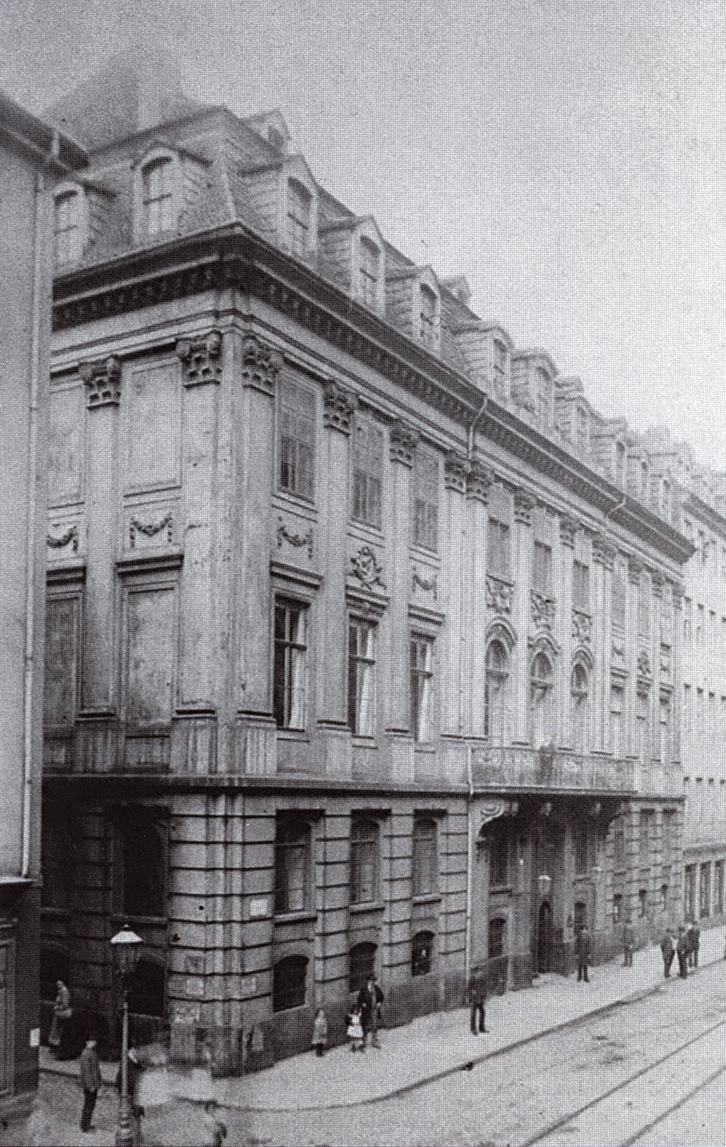 Palais Vitzthum-Schönburg, Moritzstraße Dresden, vor dem Abbruch 1885